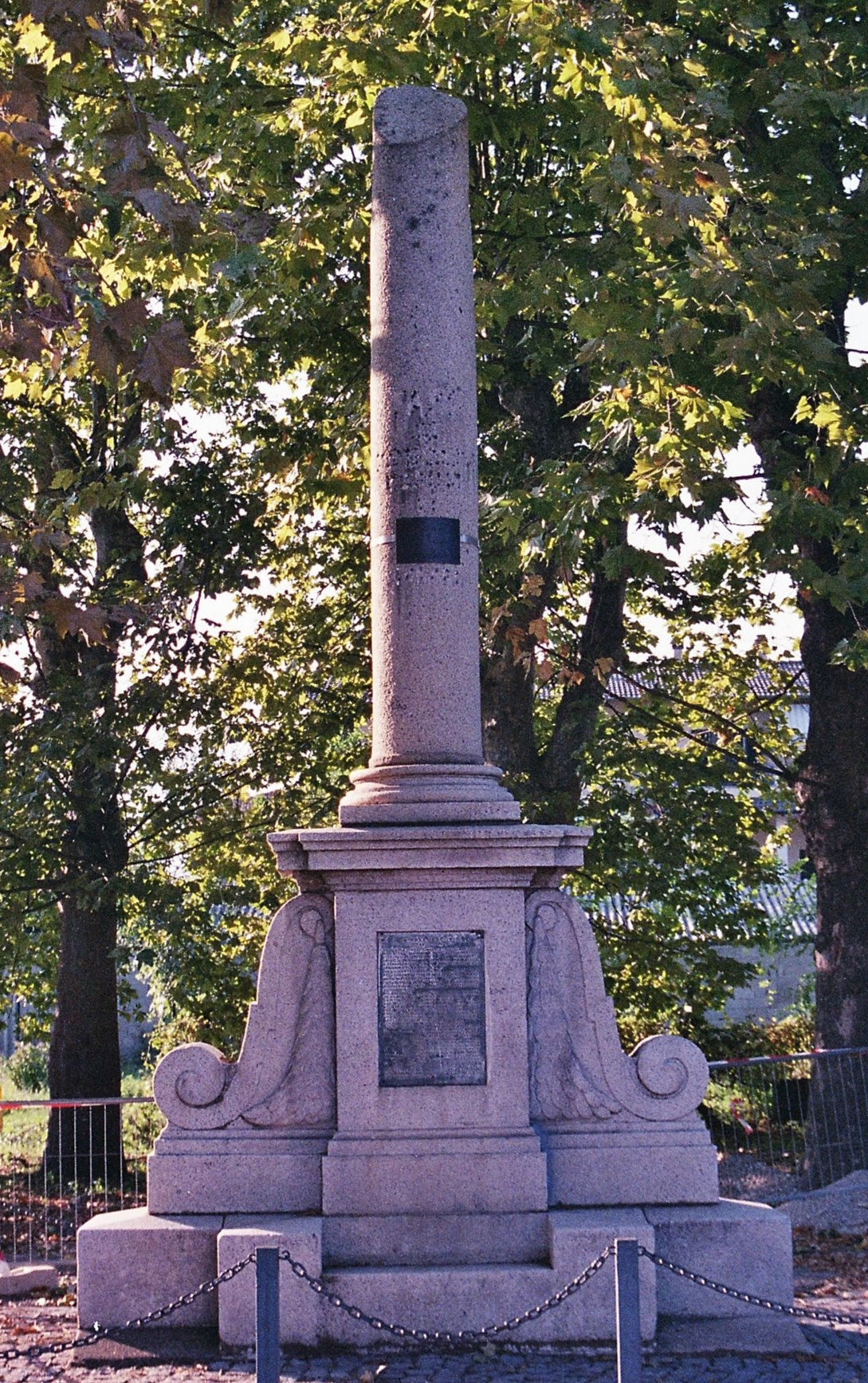 Fara Novarese, Piazza della Stazione, Monumento ai Caduti.